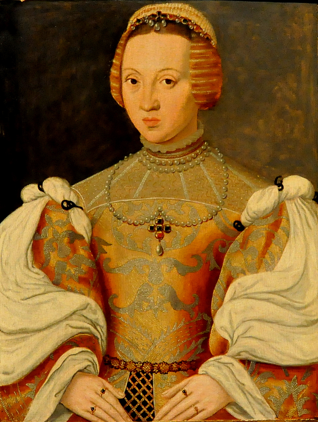 16e-eeuws schilderij van Isabella van Habsburg (1501-1526), ook Isabella van Oostenrijk genoemd, in het Stadsmuseum Gent